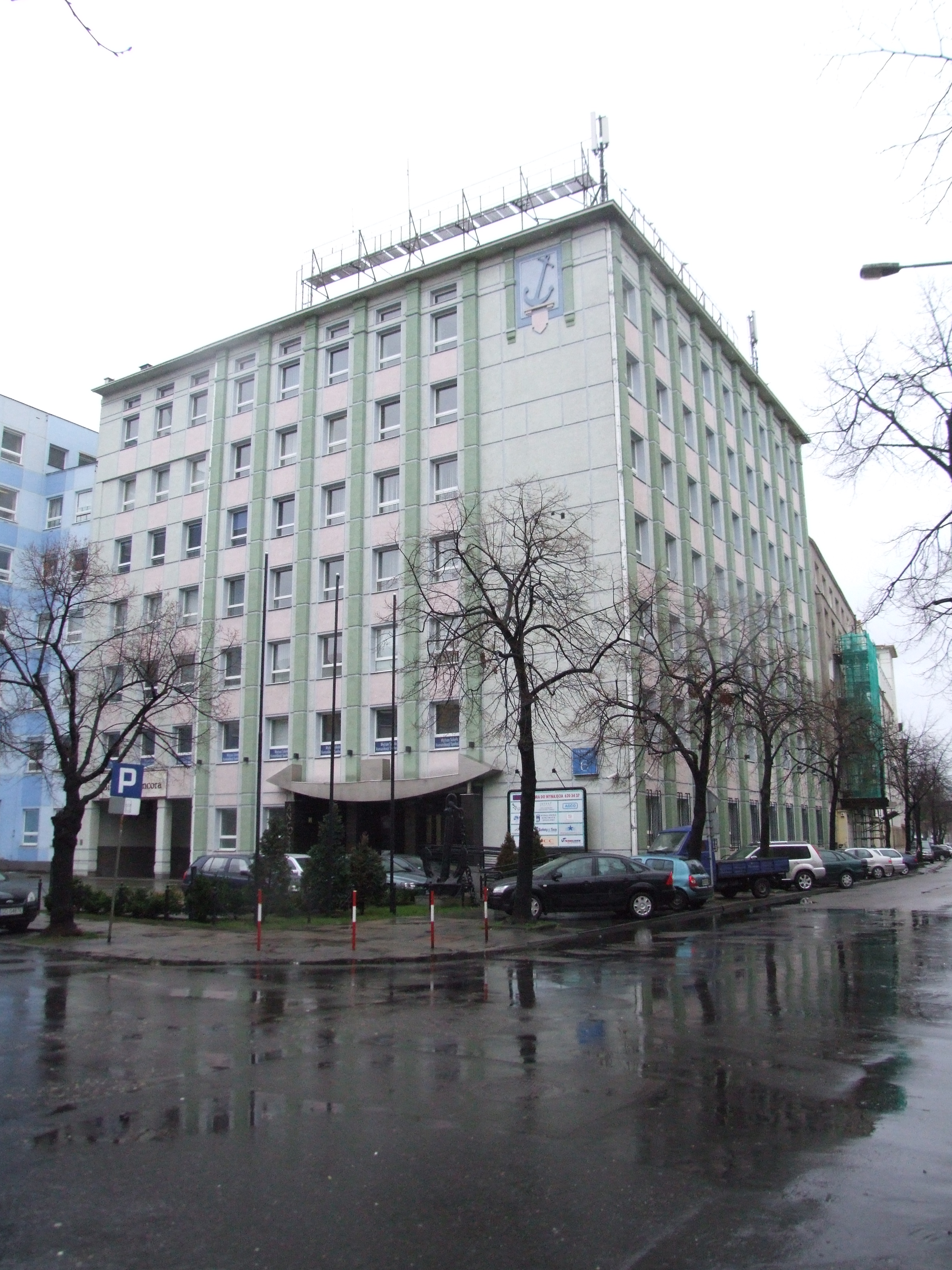 ulica Kazimierza Pułaskiego 6, Gdynia